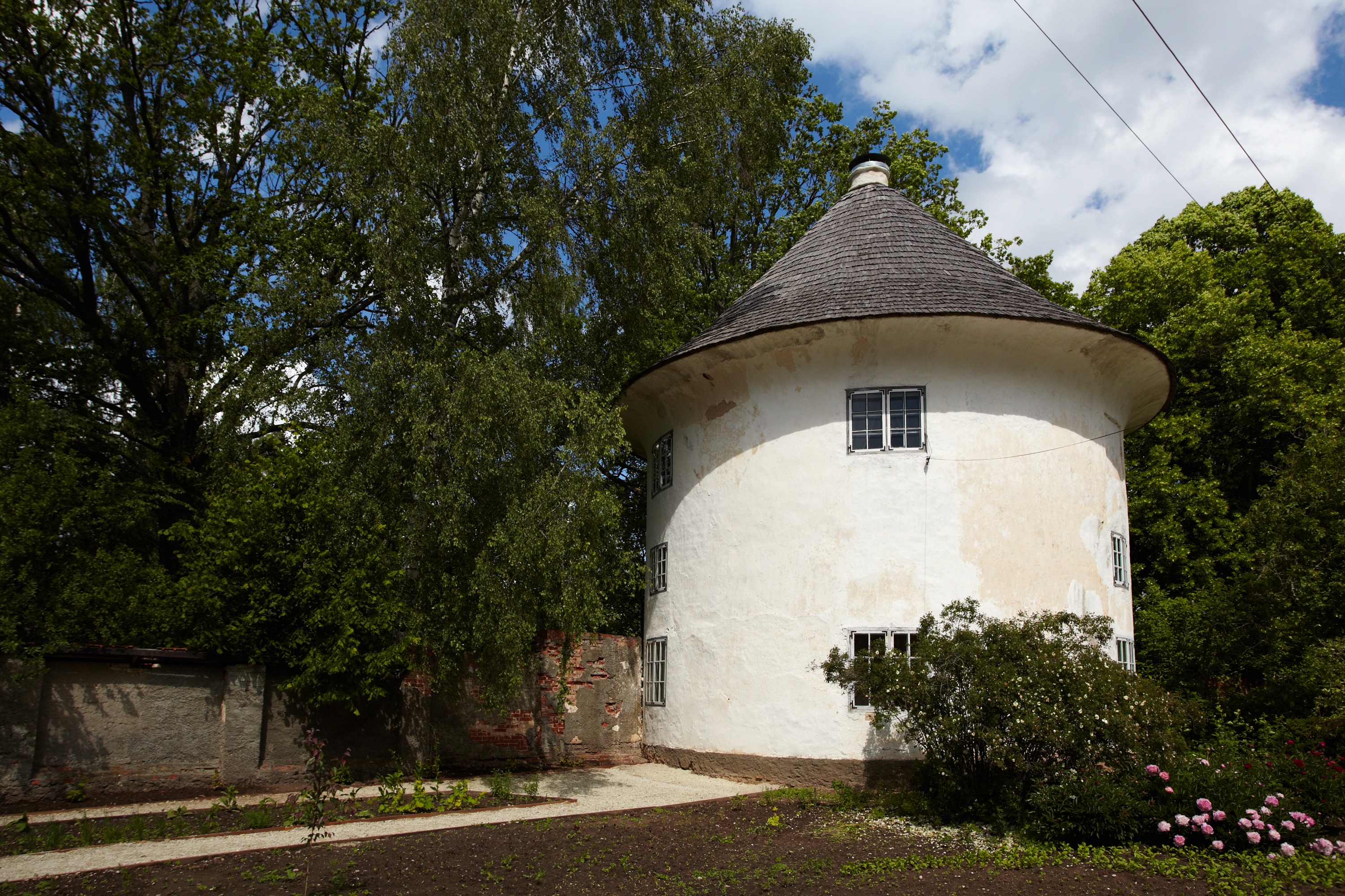 Vana-Antsla mõisa kärnerimaja juunis 2012.